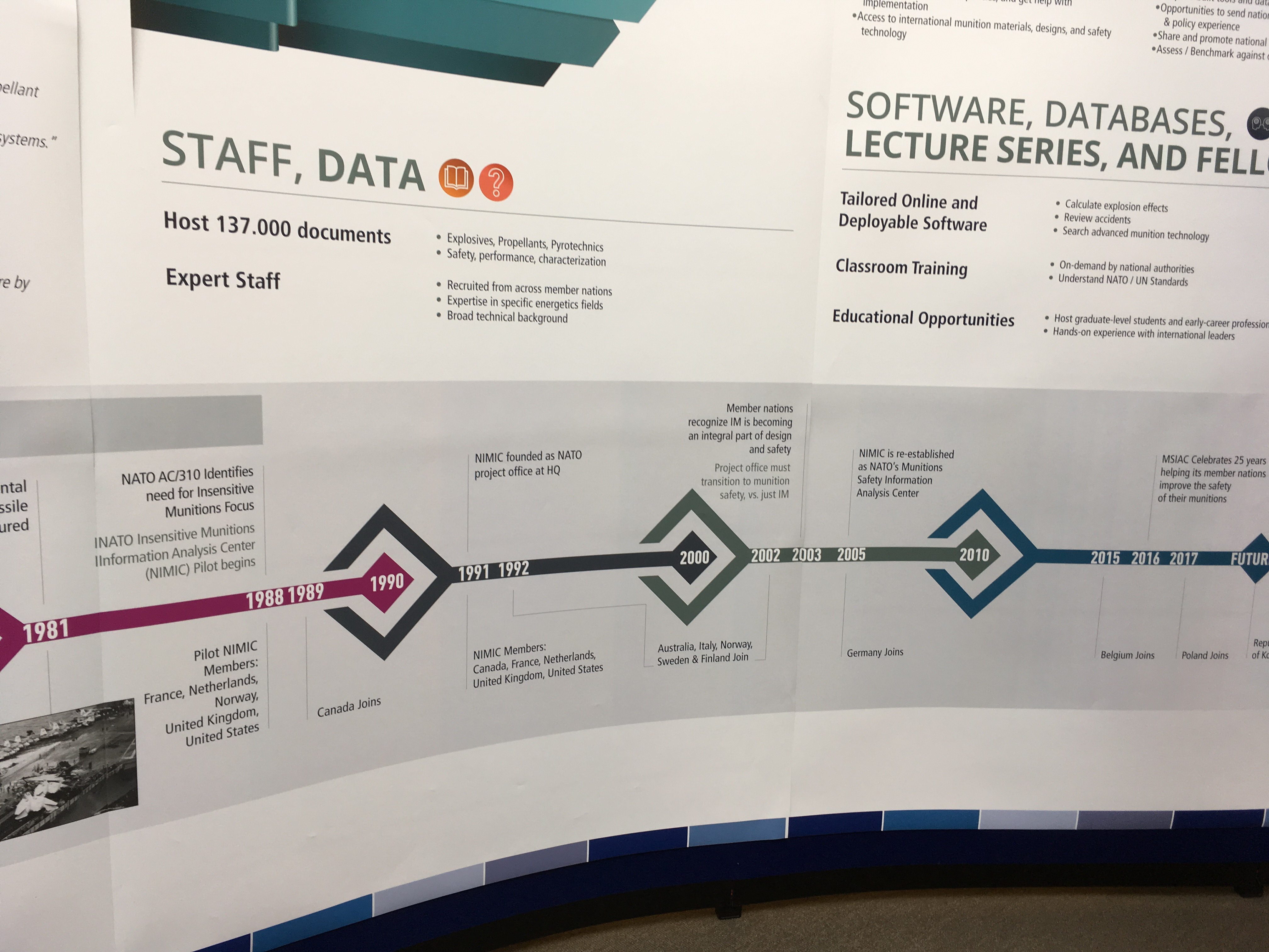 Початок історії MSIAC (фото стенду, розгорнутого у штаб-квартирі НАТО на честь 25-річниці MSIAC)